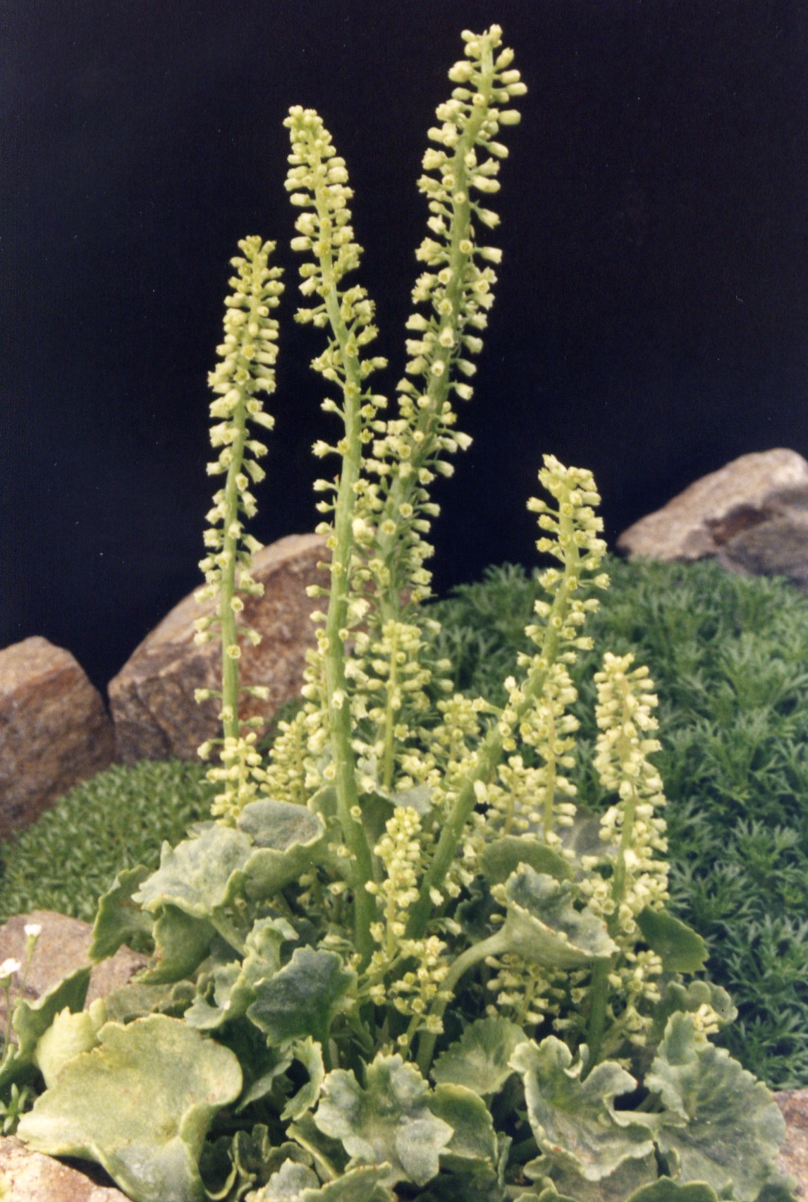 Umbilicus rupestris